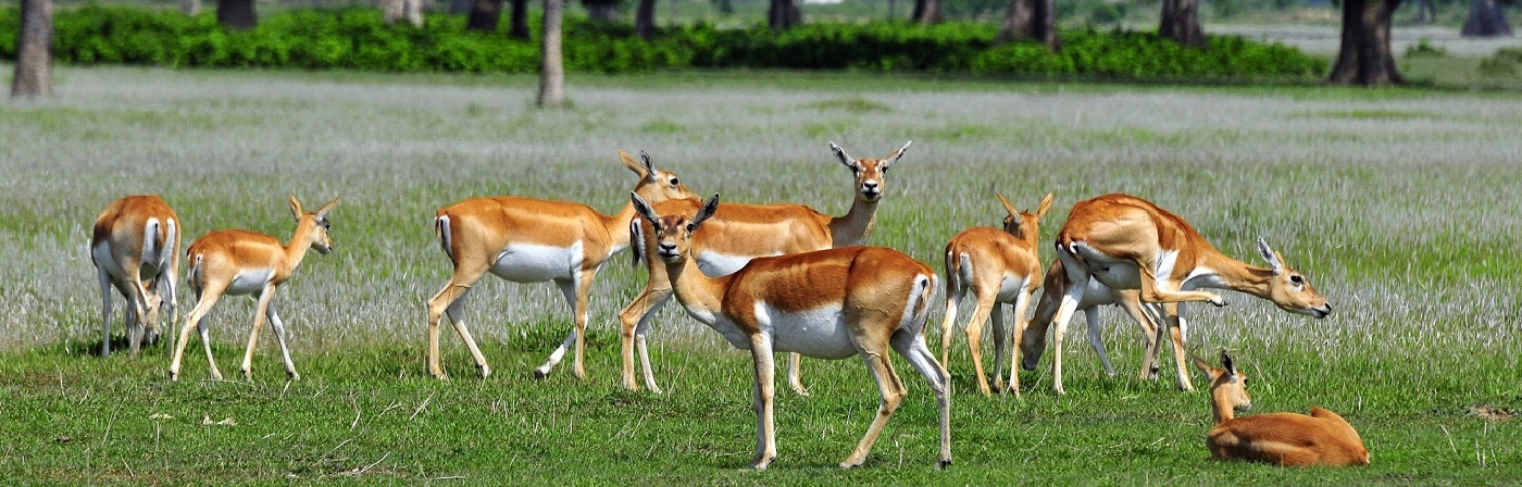 नेपाली: शुक्लाफाँटा राष्ट्रिय निकुञ्ज अन्तरगत हिरापूर कृष्णसार संरक्षण क्षेत्र